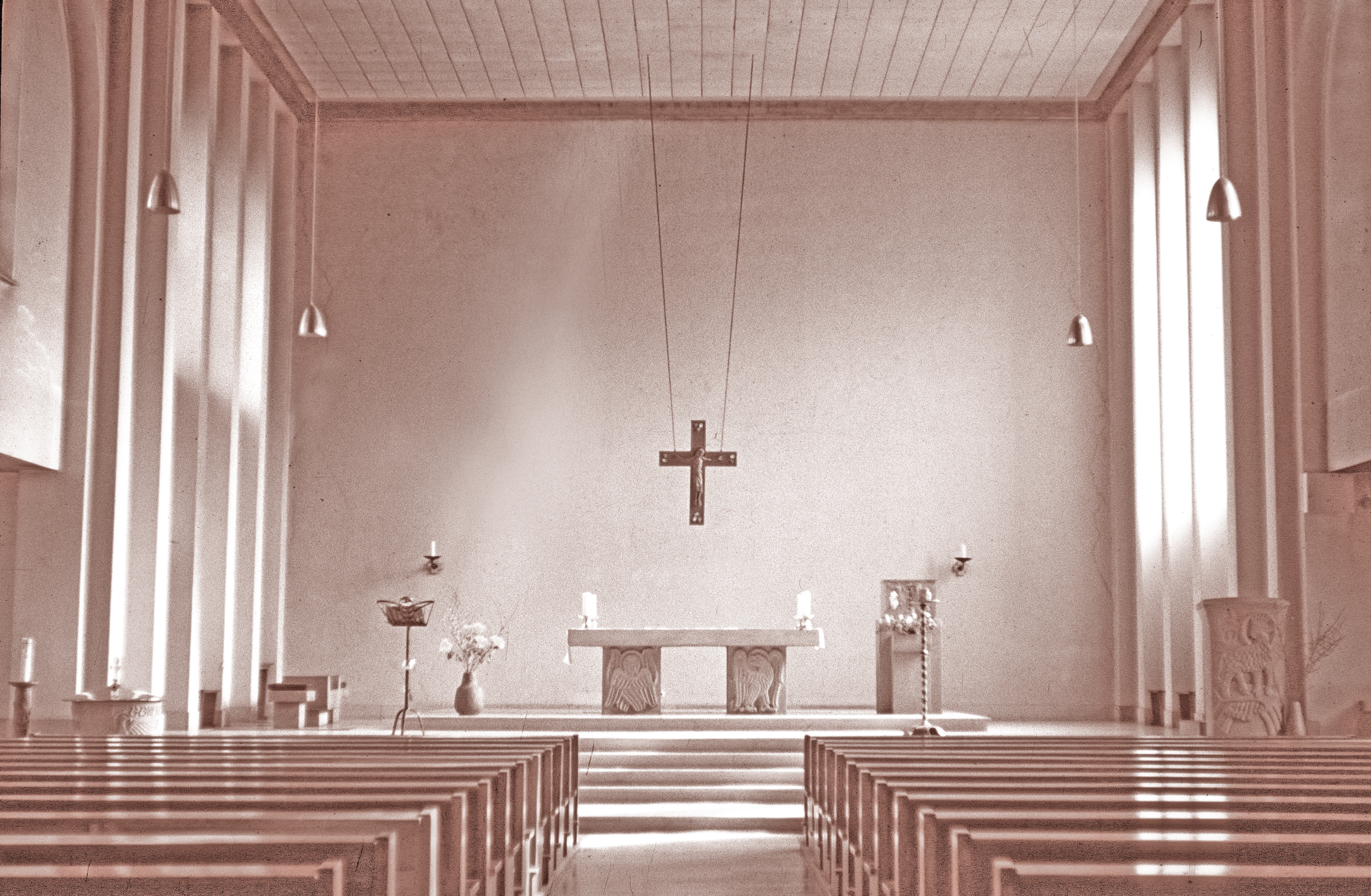 Der von den Benediktiner, aus Maria Laach, gestaltete Altarraum